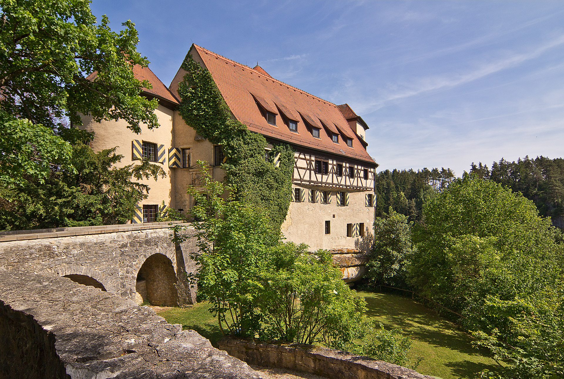 Burg Rabenstein - Ansicht aus nordwestlicher Richtung